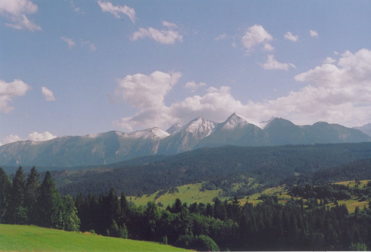 Tatry - widok ze wsi Łapszanka (województwo małopolskie).